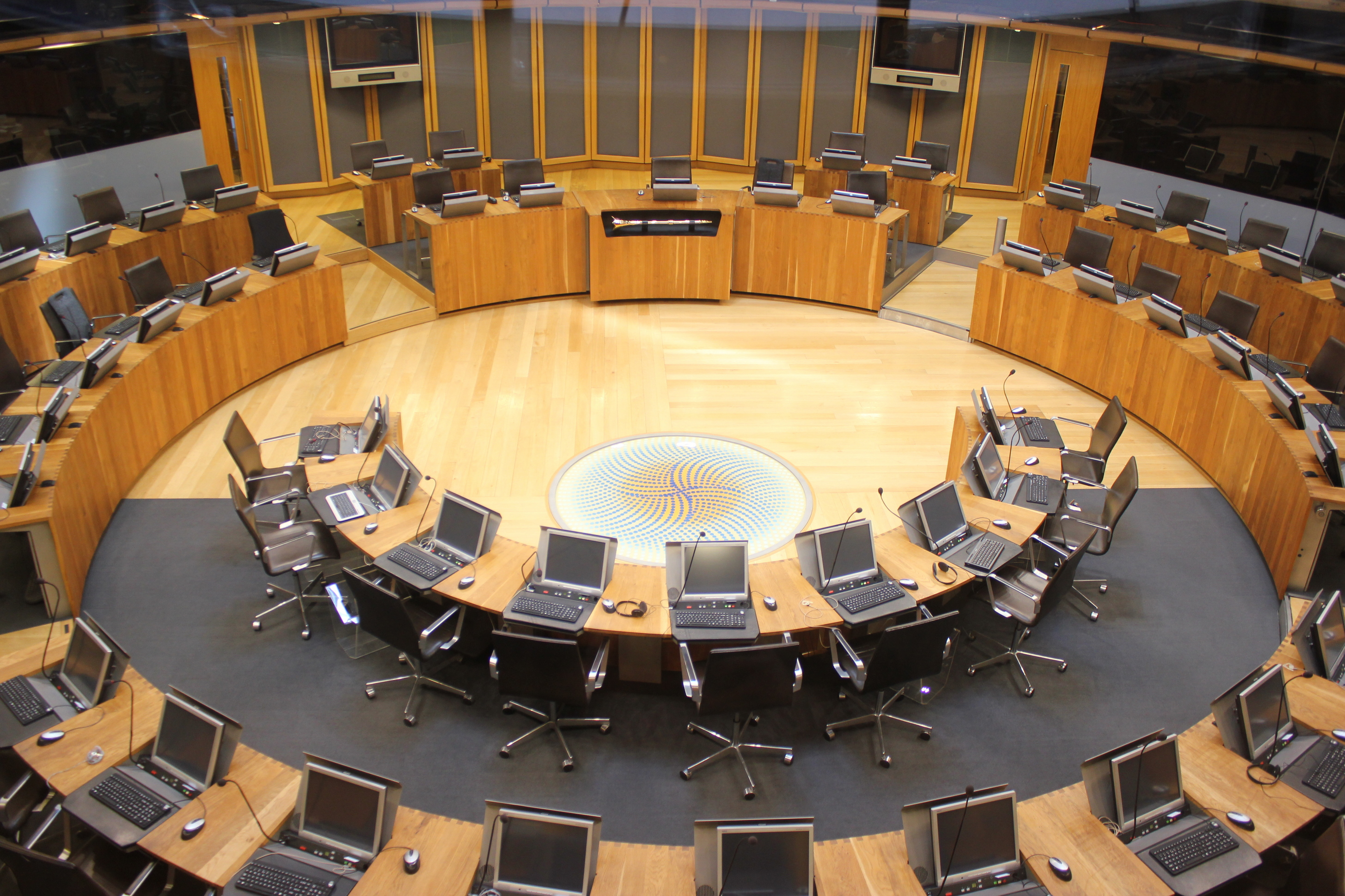 Der Plenarsaal des Senedd, Sitz des walisischen Parlamentes.